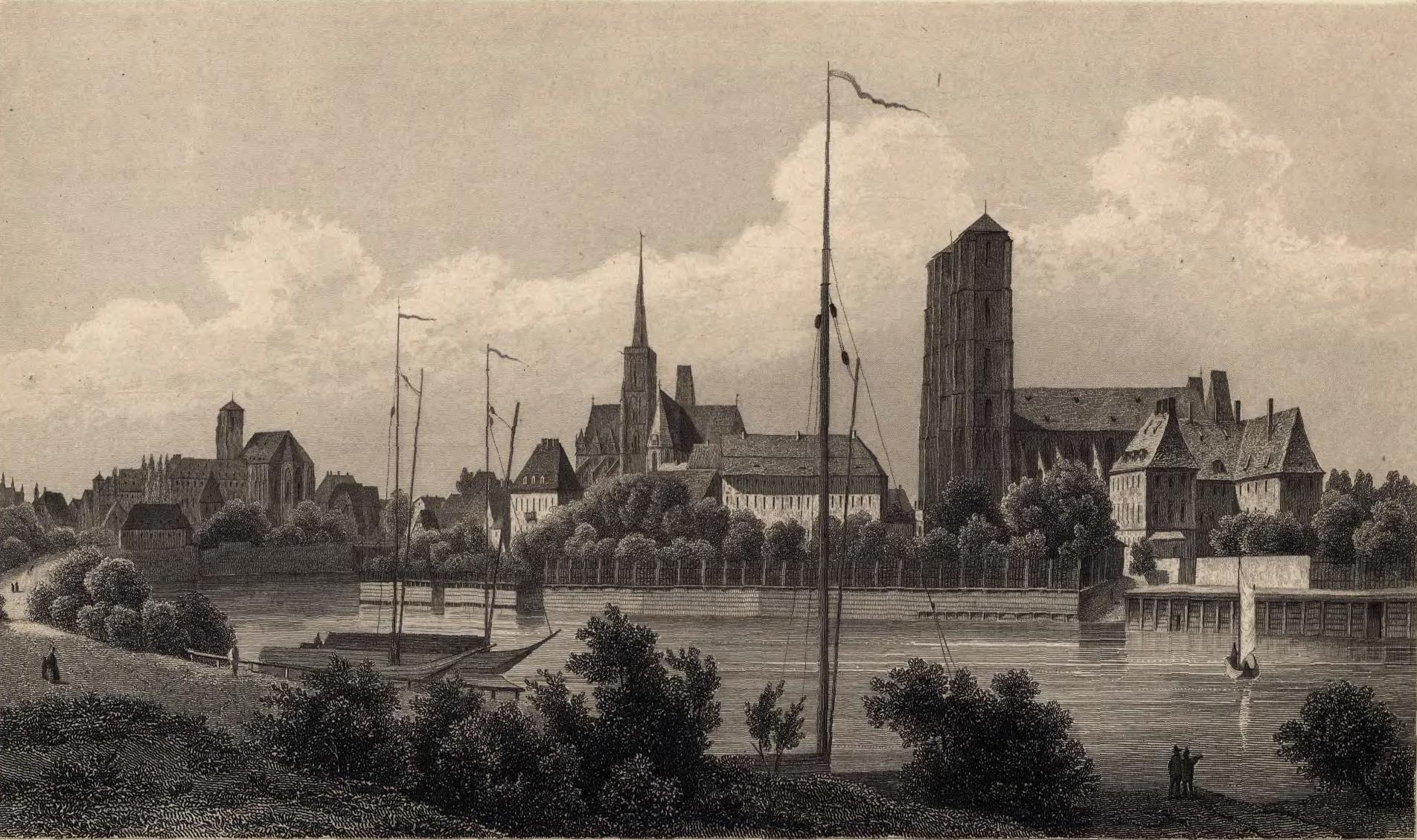 Die Sandvorstadt in Breslau von der Ziegelbastion aus gesehen.